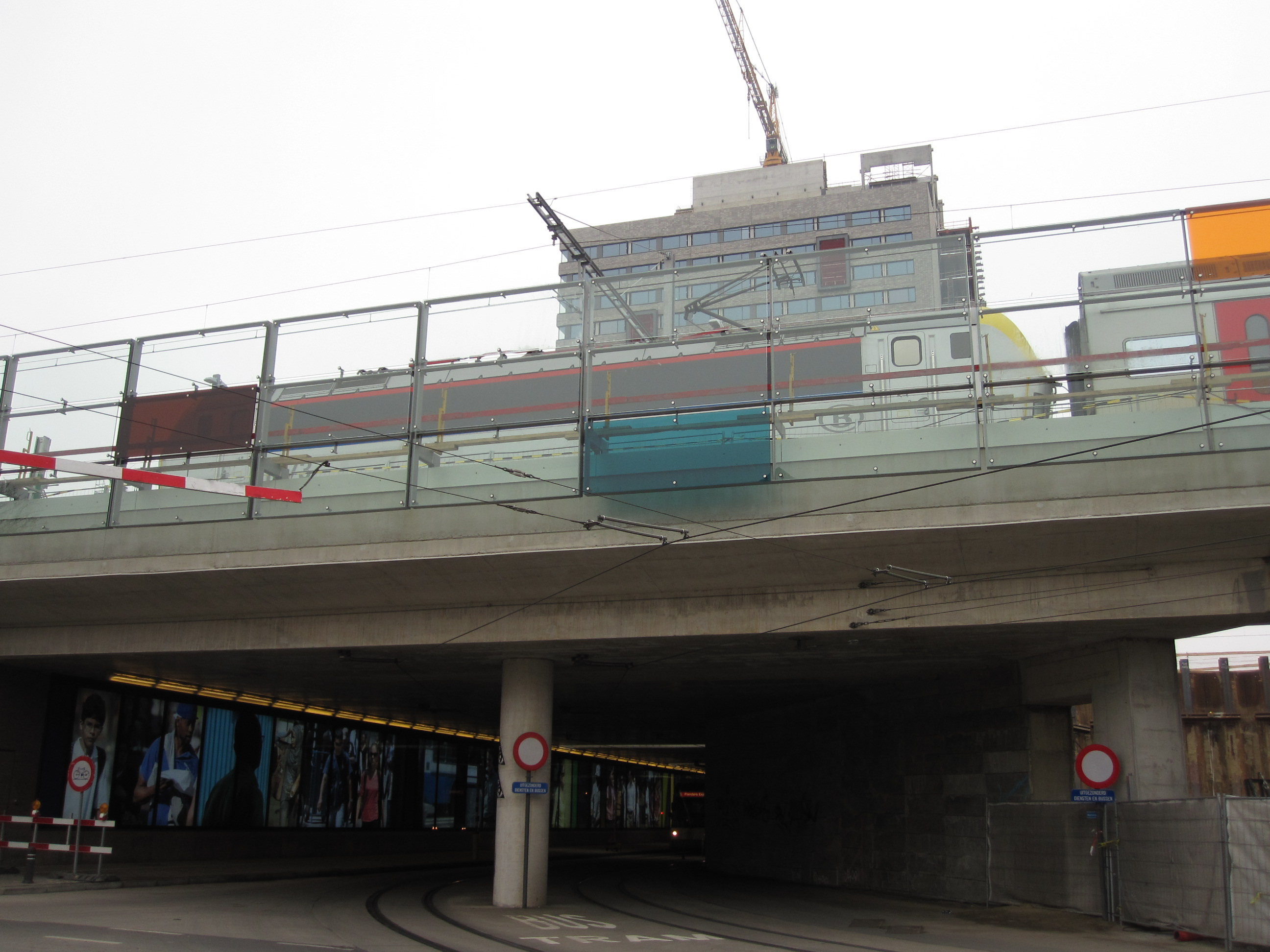 Spoor 12 is sinds het najaar van 2012 weer in gebruik genomen. Hier een dubbeldekstrein richting de kust. Locomotief staat net boven de tijdelijke tramtunnel.